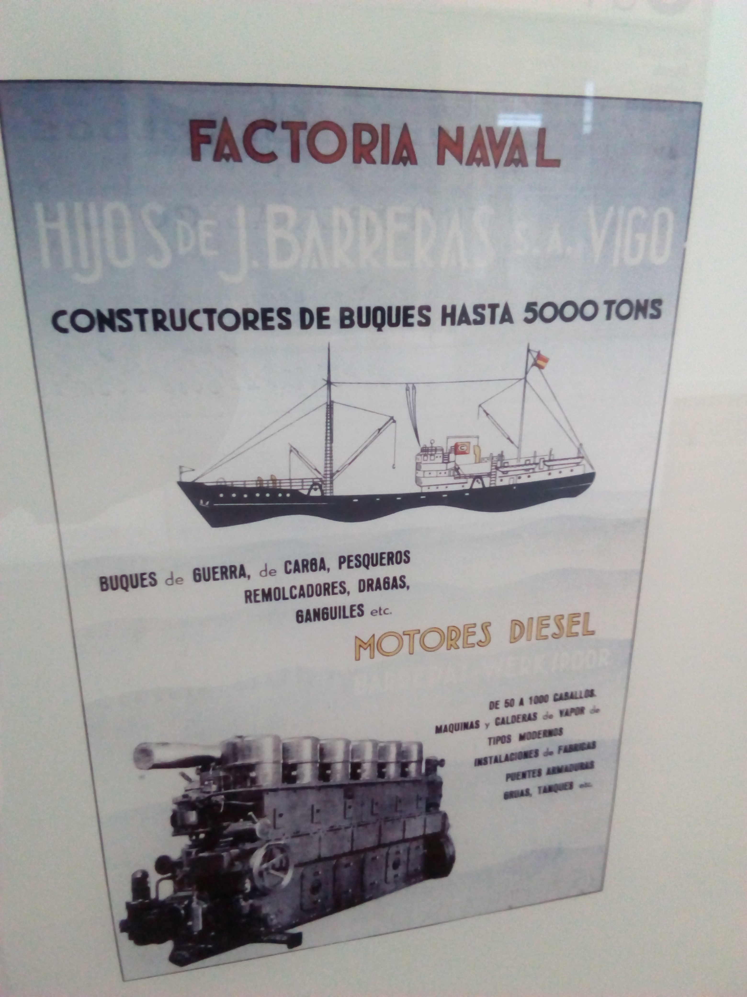 cartel barreas museo do mar de Vigo.